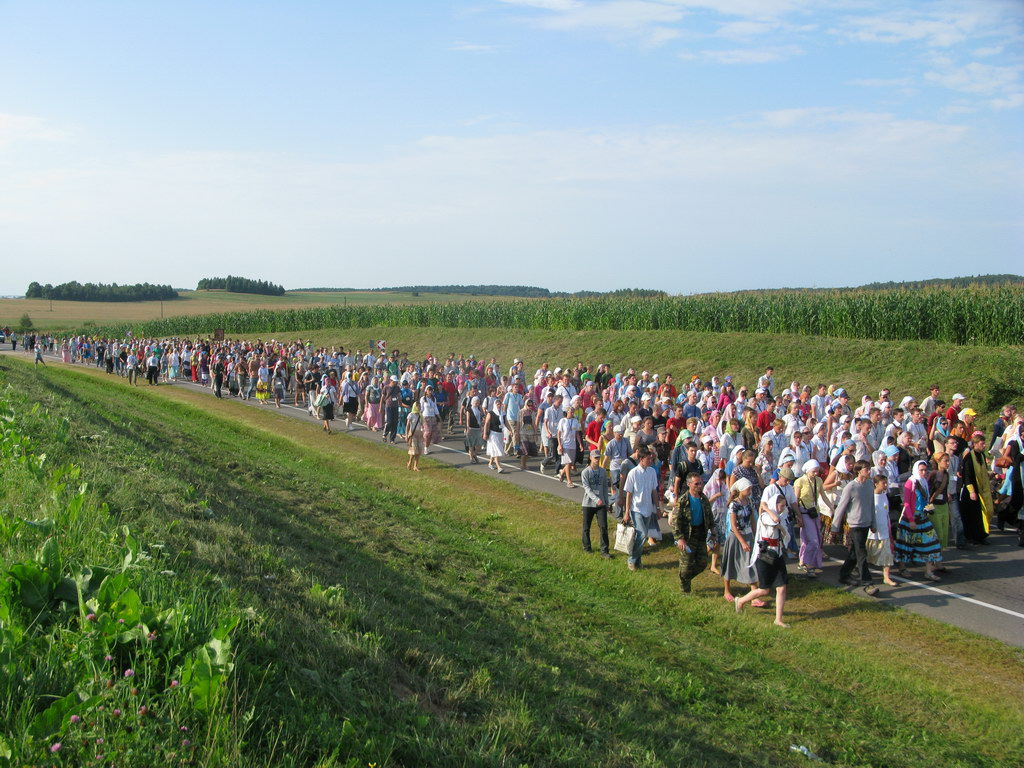 Фестиваль Братья - Крестный ход в Логойск